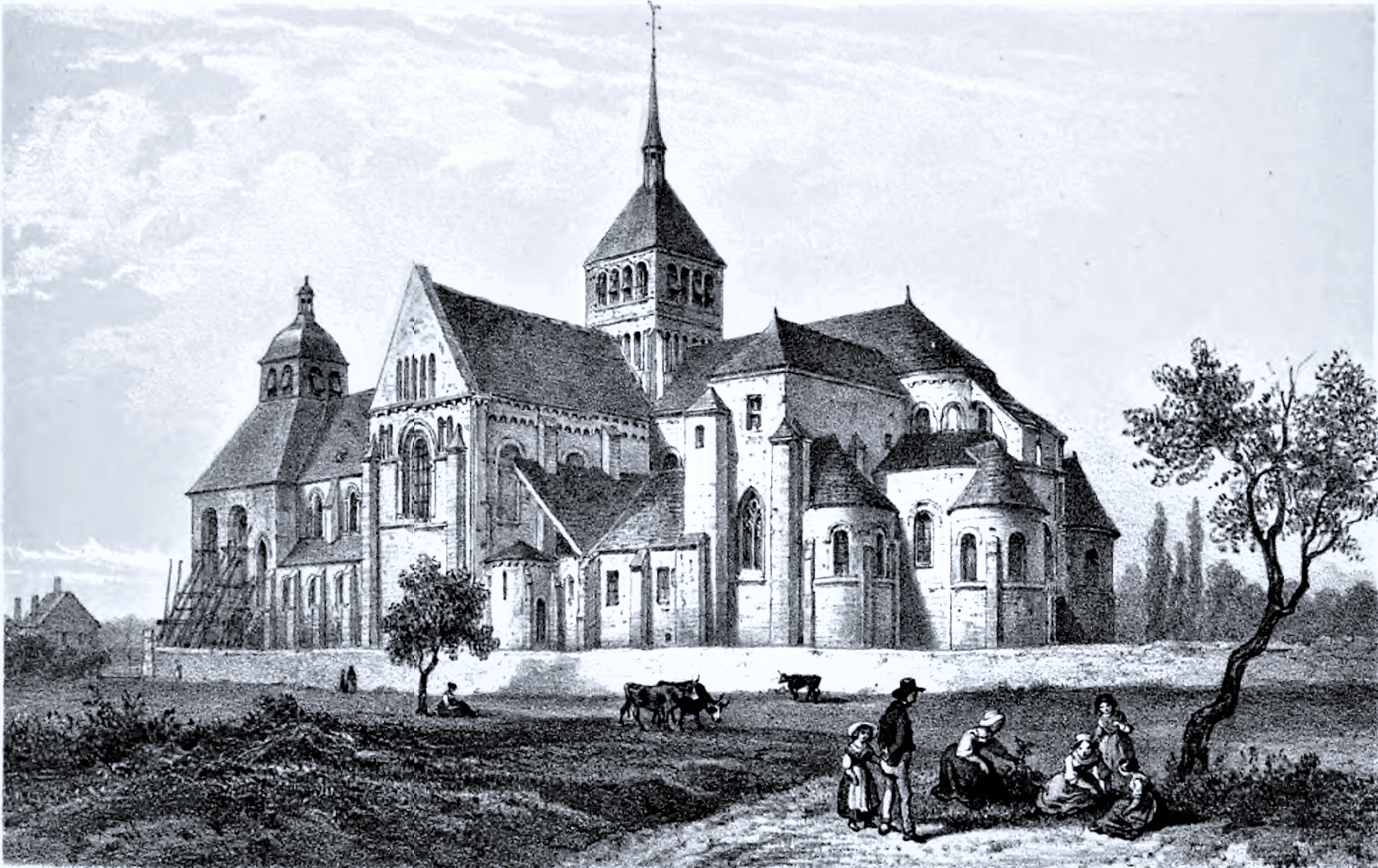 Abbaye de Saint-Benoît-sur-Loire, vue vers 1860 (image du domaine public (Rocher) modifiée)